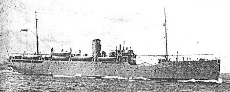 אונית מלחמה של חיל הים המצרי אמירה פאוזיה